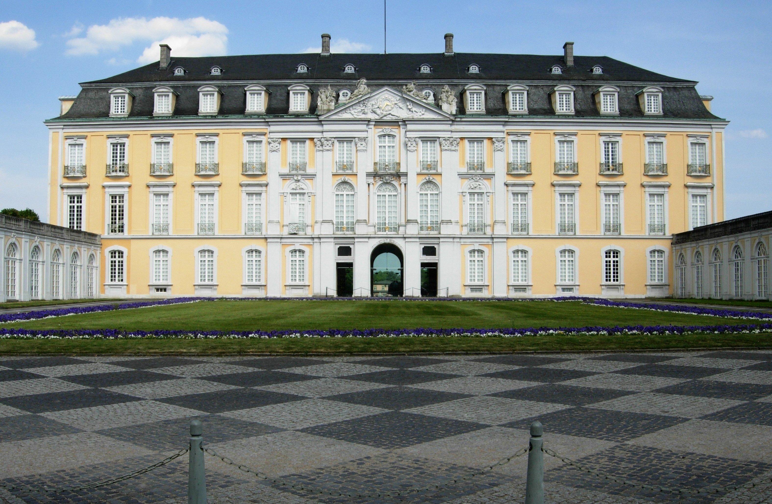 Westflügel des Schlosses Augustusburg in Brühl. Das dreiflügelige Schloss öffnet sich u-förmig nach Osten. Man erkennt durch die gläsernen Portale hindurch den DB-Bahnhof Brühl.